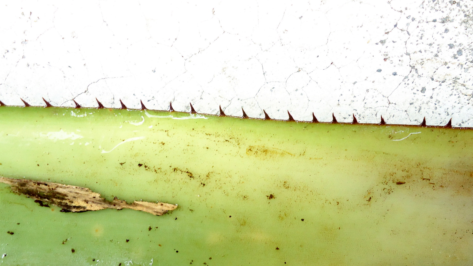 Hohenbergia stellata Schult. & Schult. f.